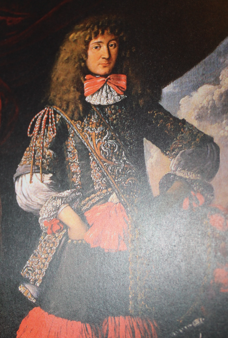 Franz Karl Anton von Hohenems Liechtensteiner Landesmuseum Gemälde von Matthias Zehender 1772